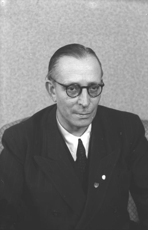 Zentralbild/Sturm 13.3.1951 Dr. Hans Loch, Stellvertretender Ministerpräsident der DDR und Minister für Finanzen.